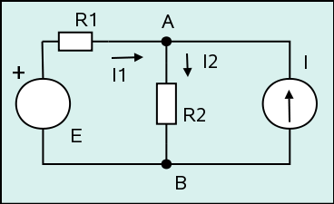 Circuito ejemplo (Example circuit)